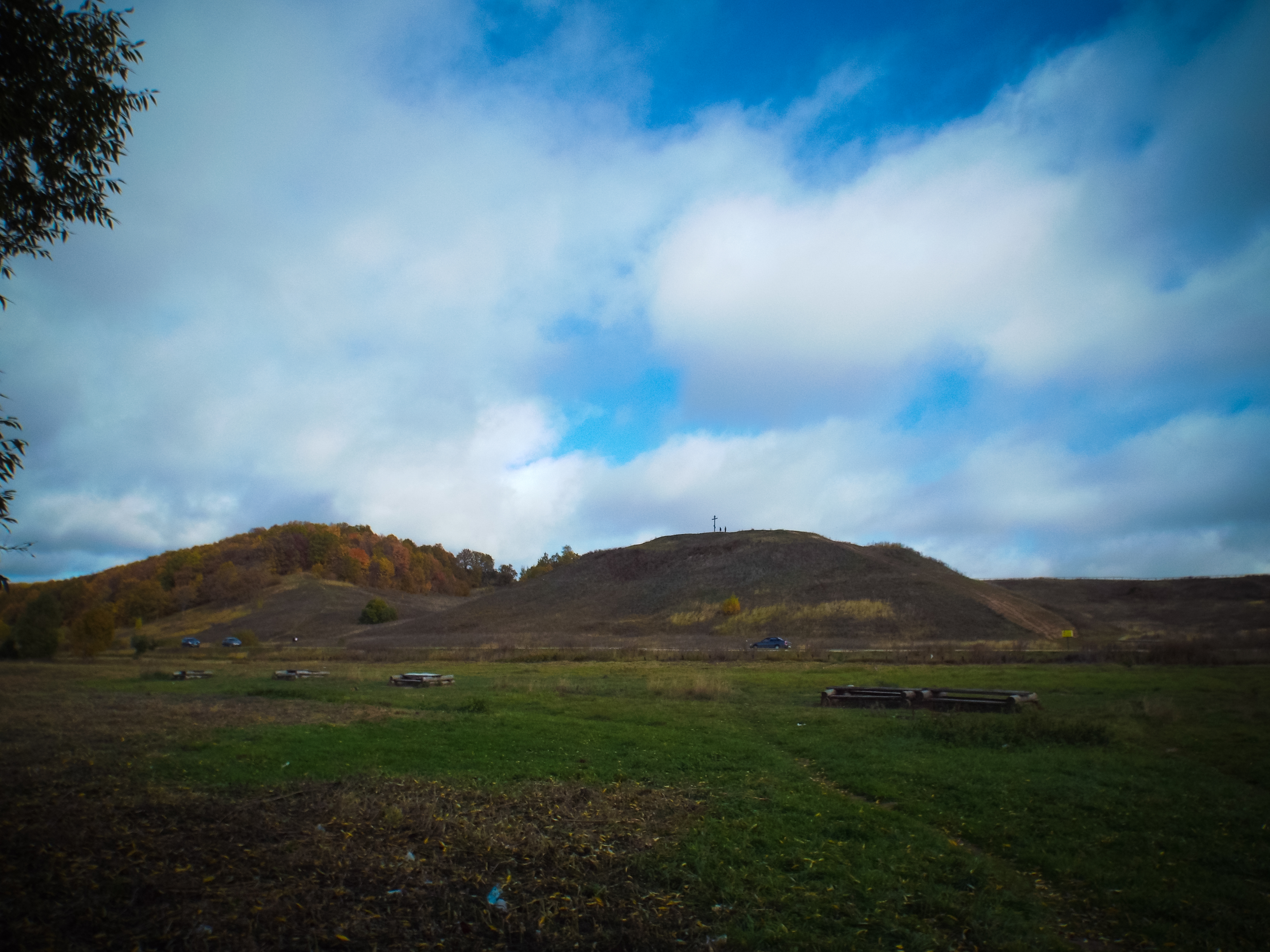 Александрова гора, Переславский район This image is related to the protected area of Russia number 7600253